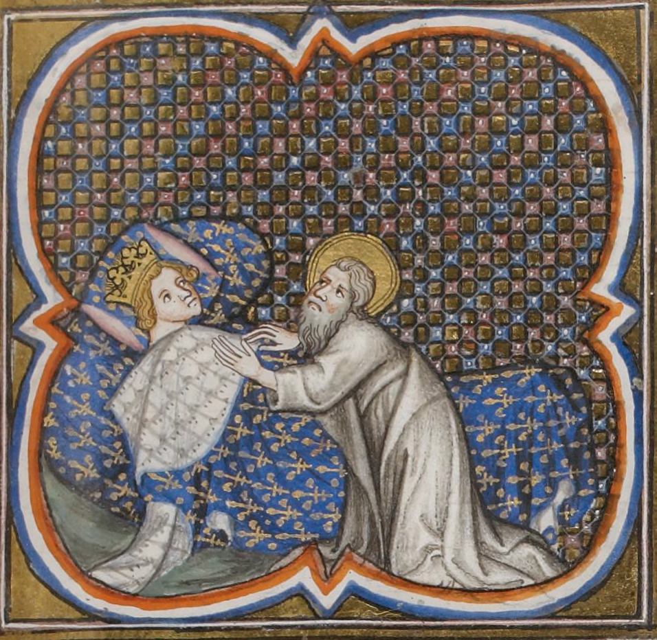 French School, Apparition of Saint Valery to Hugh Capet (941-996) Miniature from the Grandes Chroniques de France, Paris.